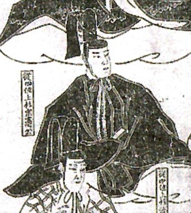 上杉宗憲の肖像。